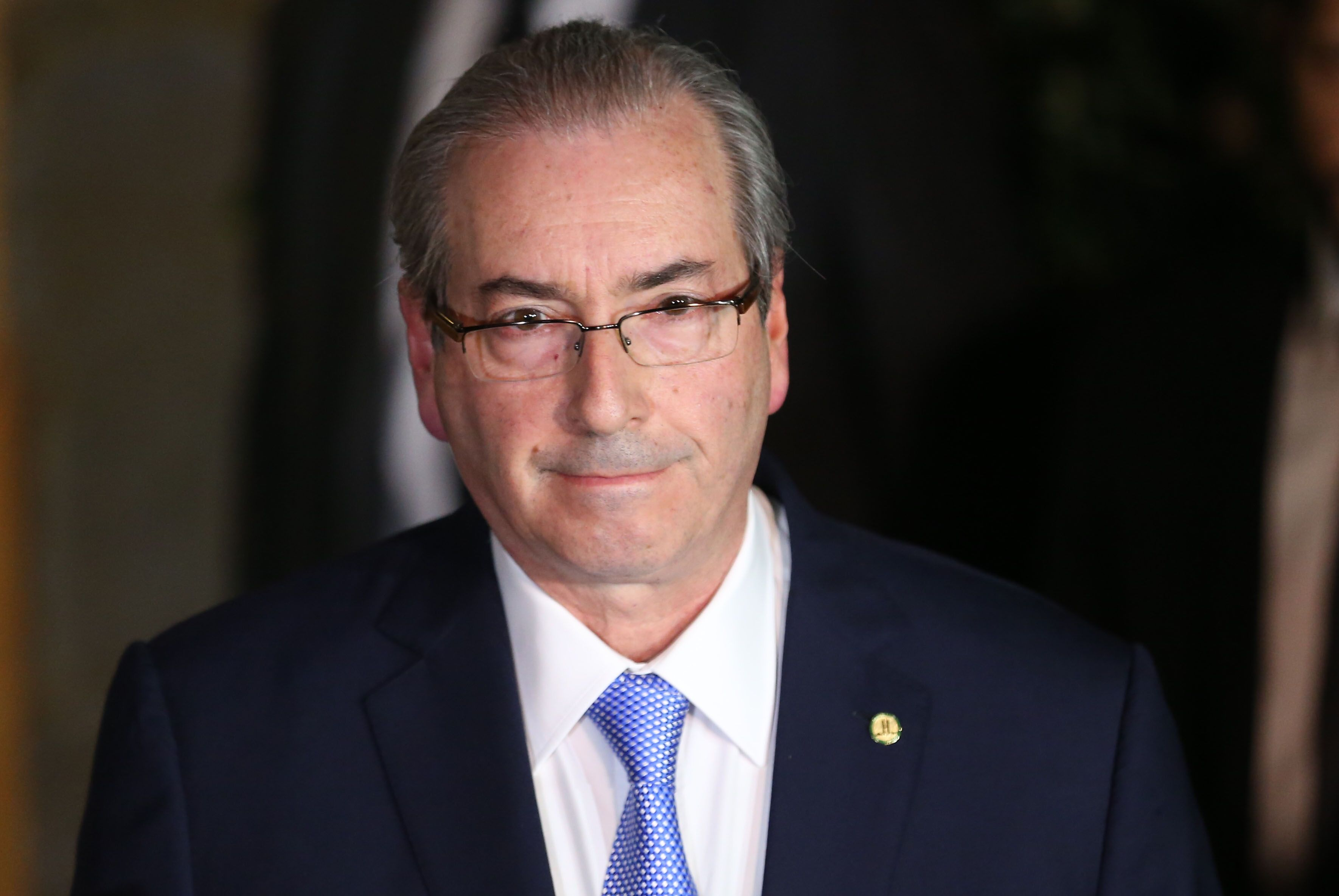 Eduardo Cunha concede entrevista sobre a decisão do Supremo Tribunal Federal de manter seu afastamento do mandato de deputado federal e da presidência da Câmara.